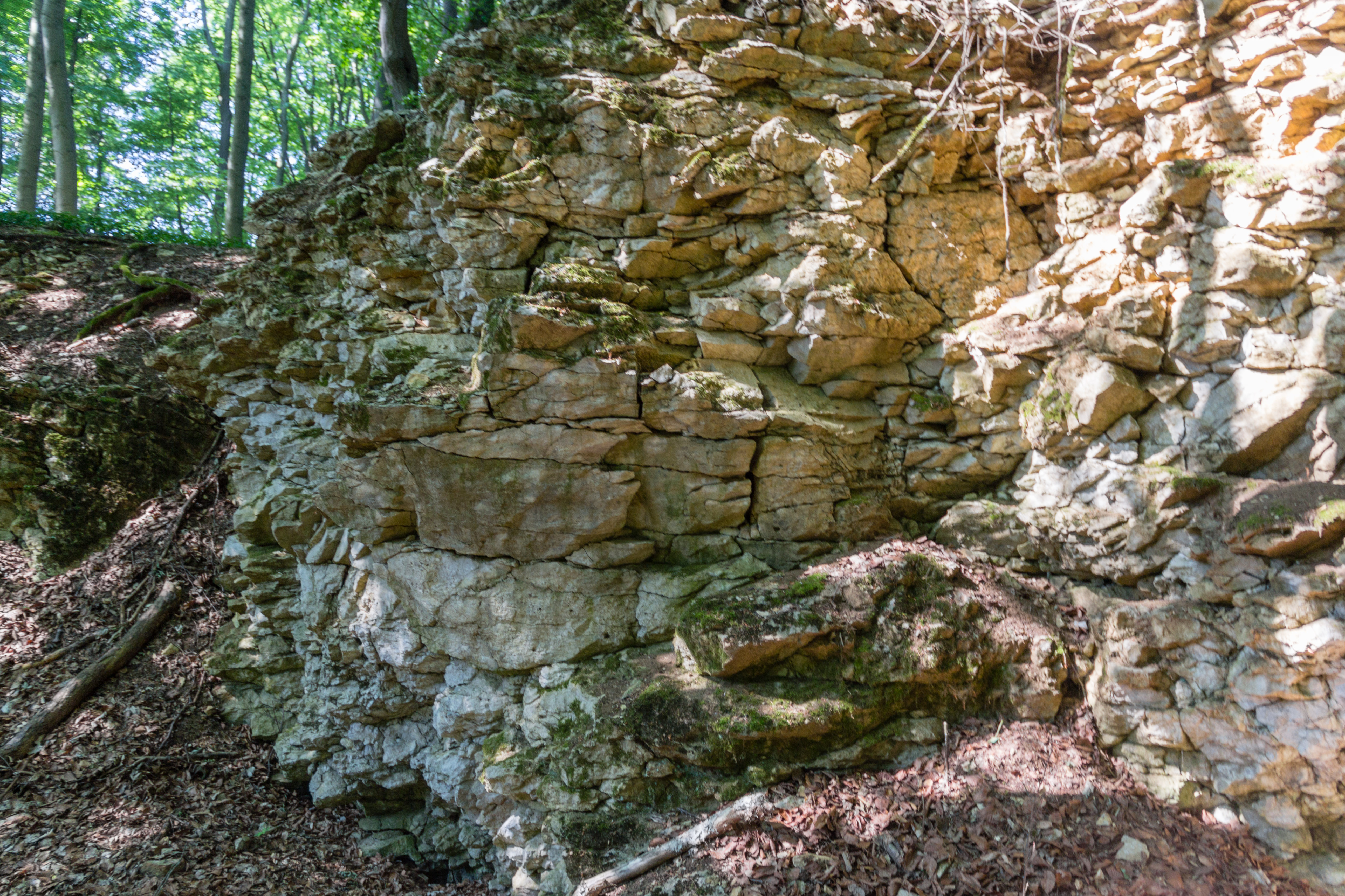 Steinbruch Flur Kesselgrub, Weissenbrunn, Leinburg, Geotop